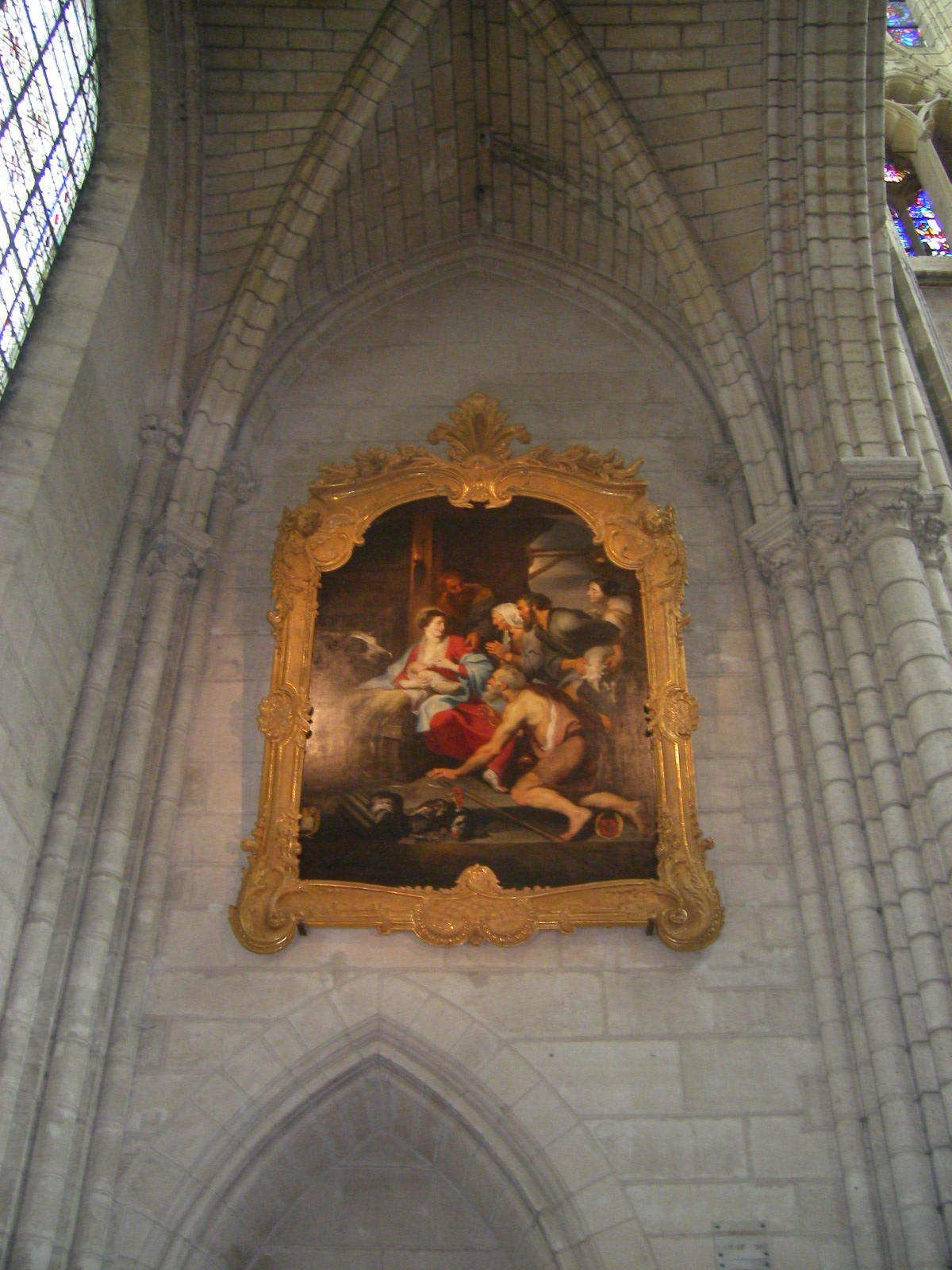 Cathédrale Saint-Gervais-et-Saint-Protais de Soissons, Adoration des bergers par Rubens, provenant de l'ancien couvent des Cordeliers de Soissons.